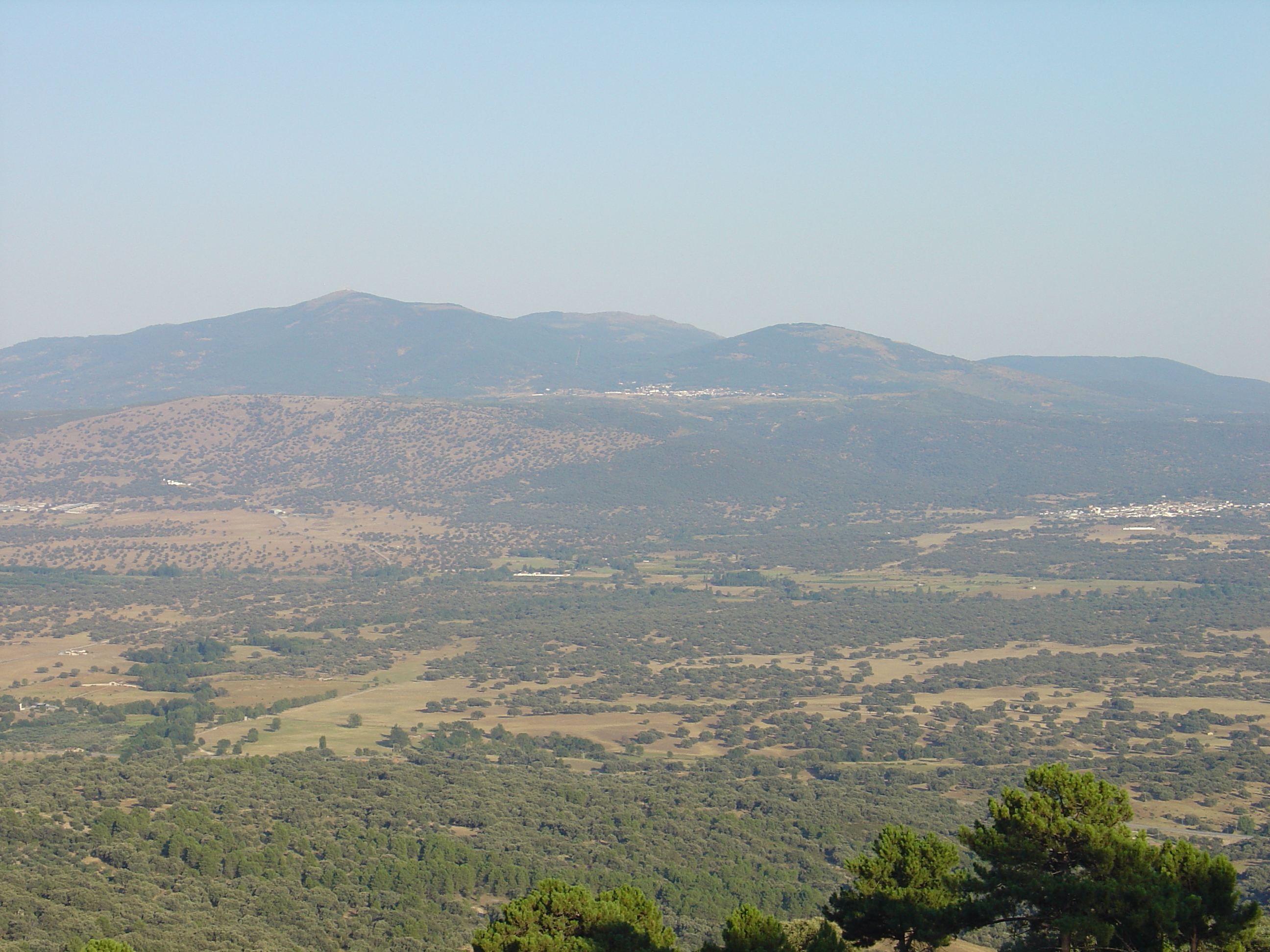 Toma de la Sierra de San Vicente, en su vertiente norte, vista desde Pedro Bernardo, pueblo denominado también "balcón del Tietar".